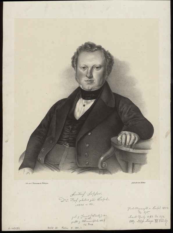 Friedrich Fischer (* 31. Dezember 1801 in Honau, Württemberg; † 14. November 1853 in Winnenden) war ein deutscher Philosoph. Friedrich Fischer wurde 1830 Dozent in Tübingen, 1832 Dozent in Basel und bald darauf außerordentlicher Professor der Philosophie in Basel. Ab 1835 war er ordinierter Professor und 1838 Rektor.